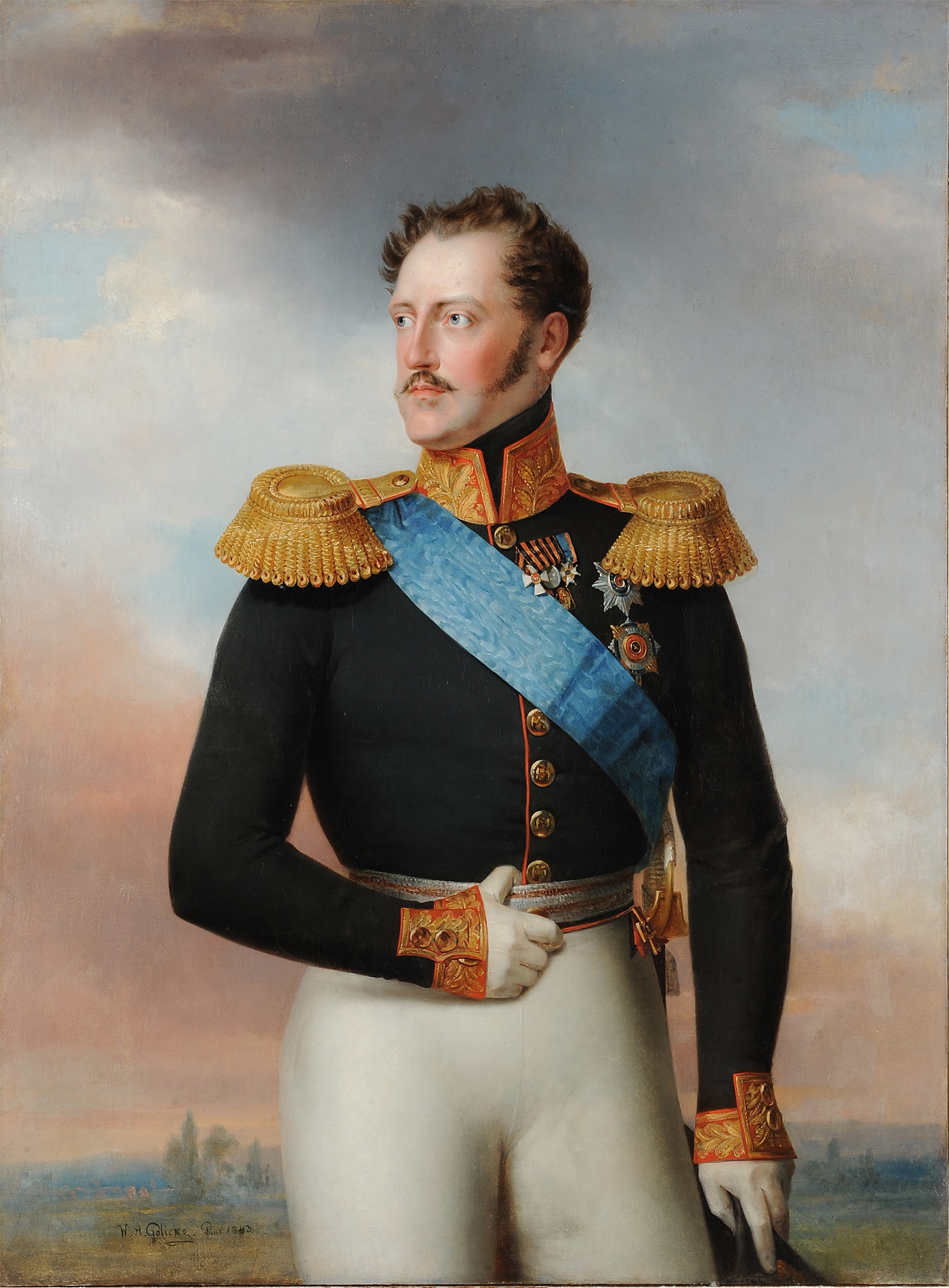 Портрет Николая I. Русский музей